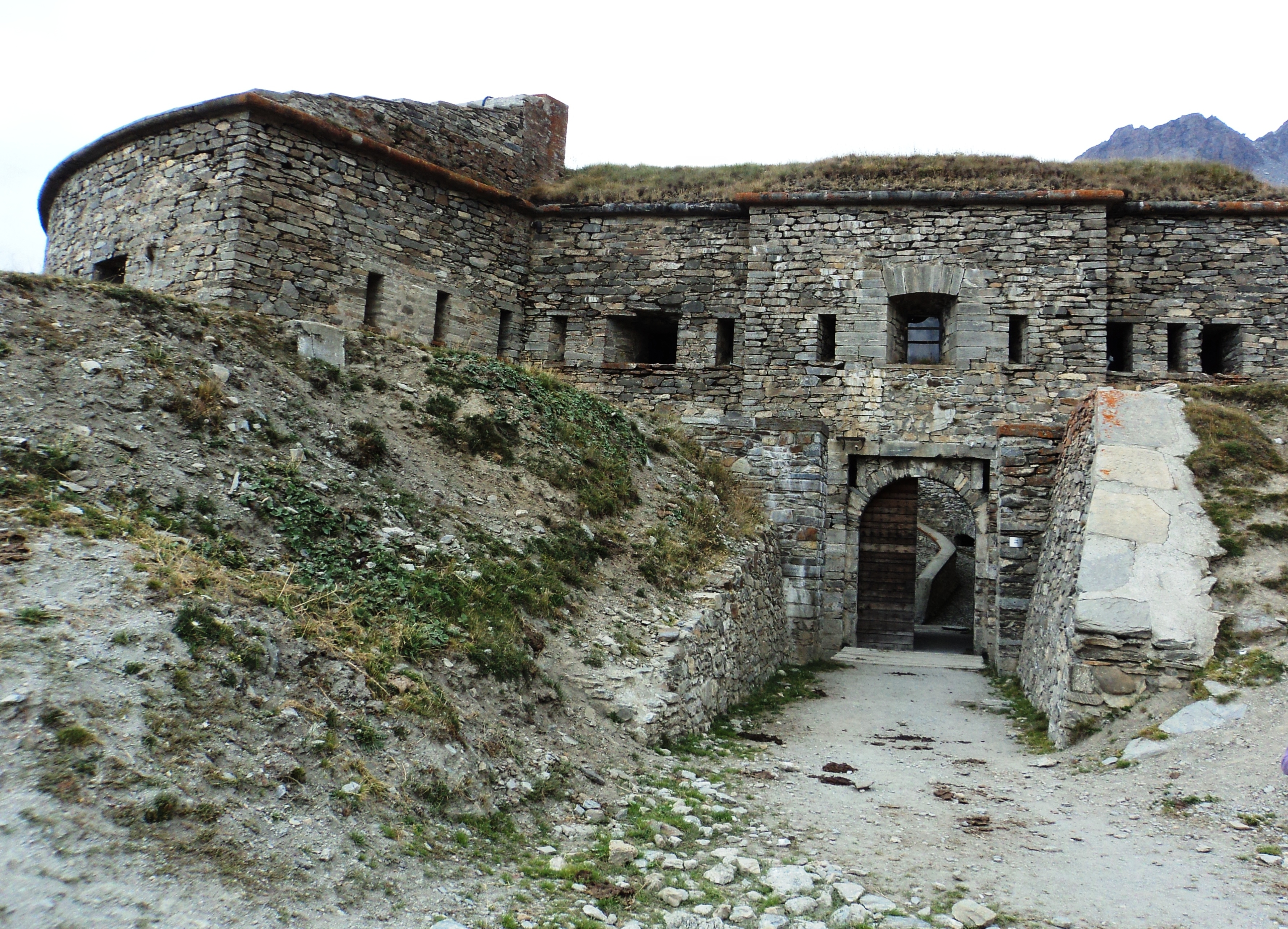 Ingresso al Forte Roncia sopra il Lago del Moncenisio.